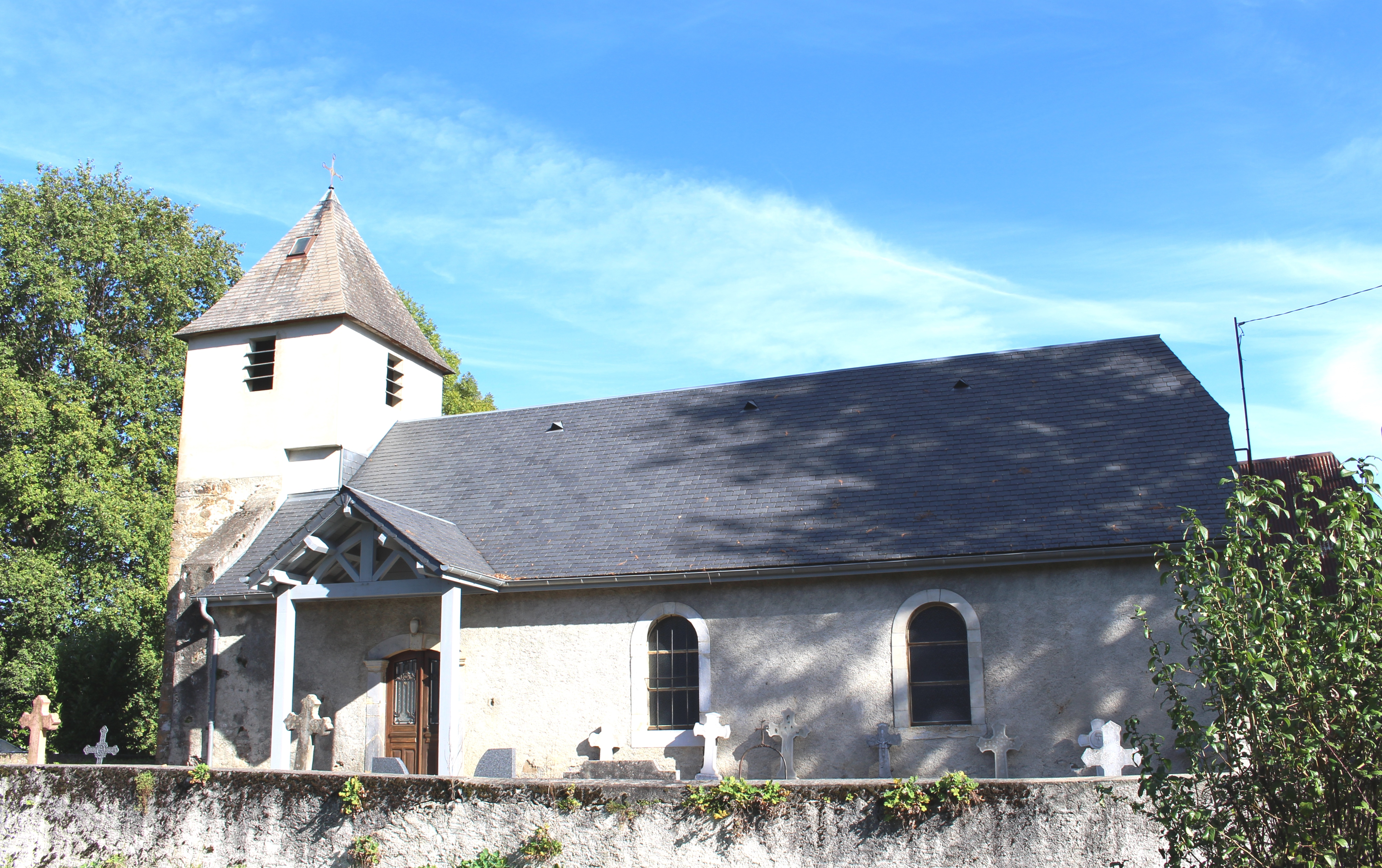 Église Saint-Pierre d'Ossun-ez-Angles (Hautes-Pyrénées)